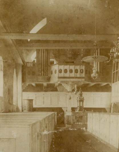 Orgelempore der Mauritiuskirche in Hollern, Niedersachsen; 1901 erfolgte ein Umbau der Empore; die Fotografie hält den Zustand vorher fest.